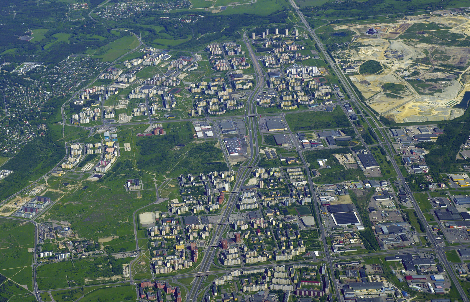 Õhuvaade Laagna asumile ja Laagna teele